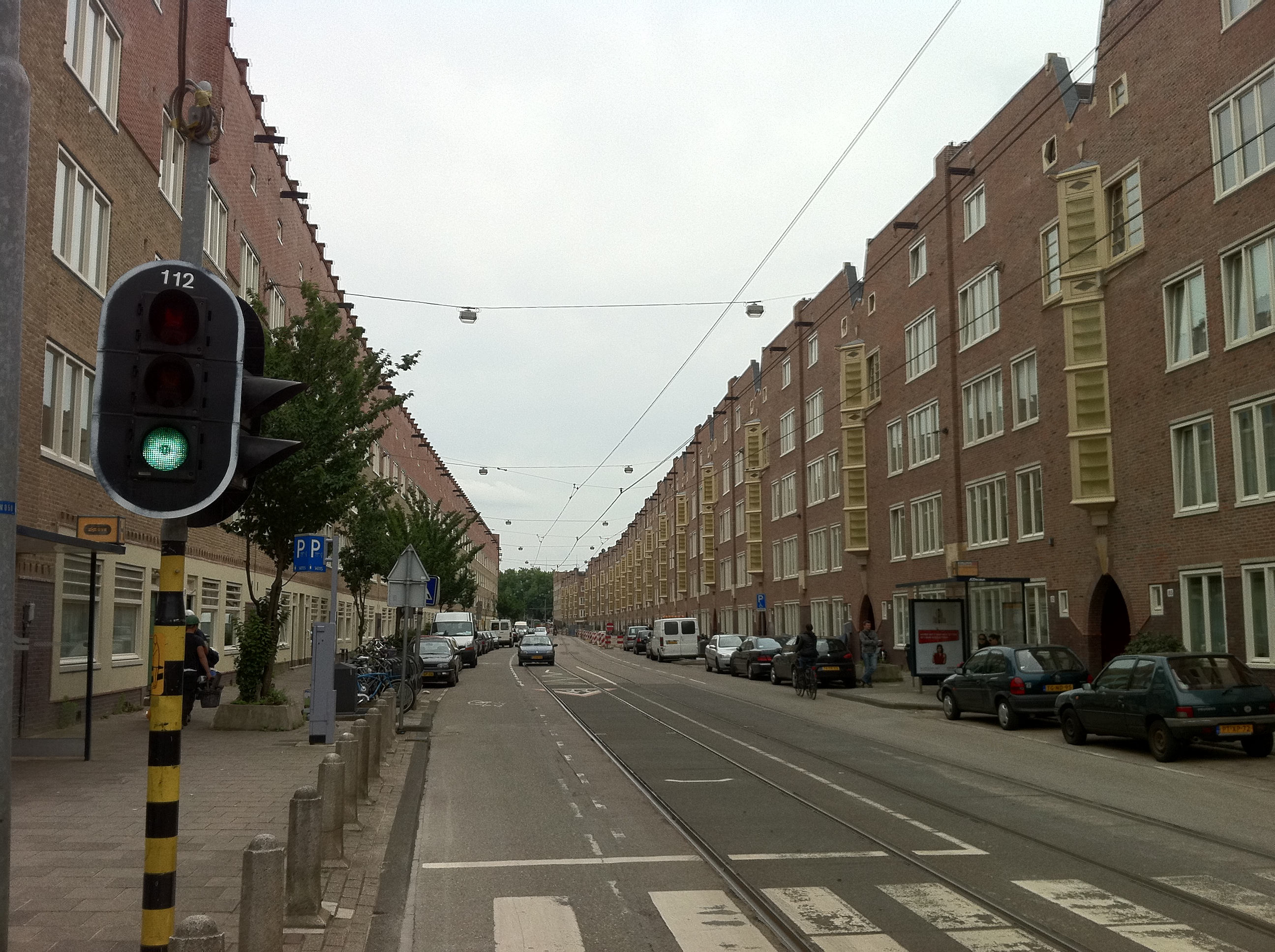 Witte de Withstraat Amsterdam-West, gebouwd door Lobatto, eigendom van woningcorporatie Ymere. in 1925 kwam het blok in de Witte de Withstraat 40 t/m 94 (tezamen 99 nieuwbouwwoningen en 5 winkelruimtes) in Plan West van de vennootschappen Fronton, Nieuw-Amsterdam en De Genestet, allen geleid door directeur P.H. 't Lam, via executoriale verkoop in bezit van de gemeente. Particulier verhuurder Lobatto, die het woningblok ertegenover in bezit had in de Witte de Withstraat, raakte in 1926 zijn woningen kwijt aan de gemeente.